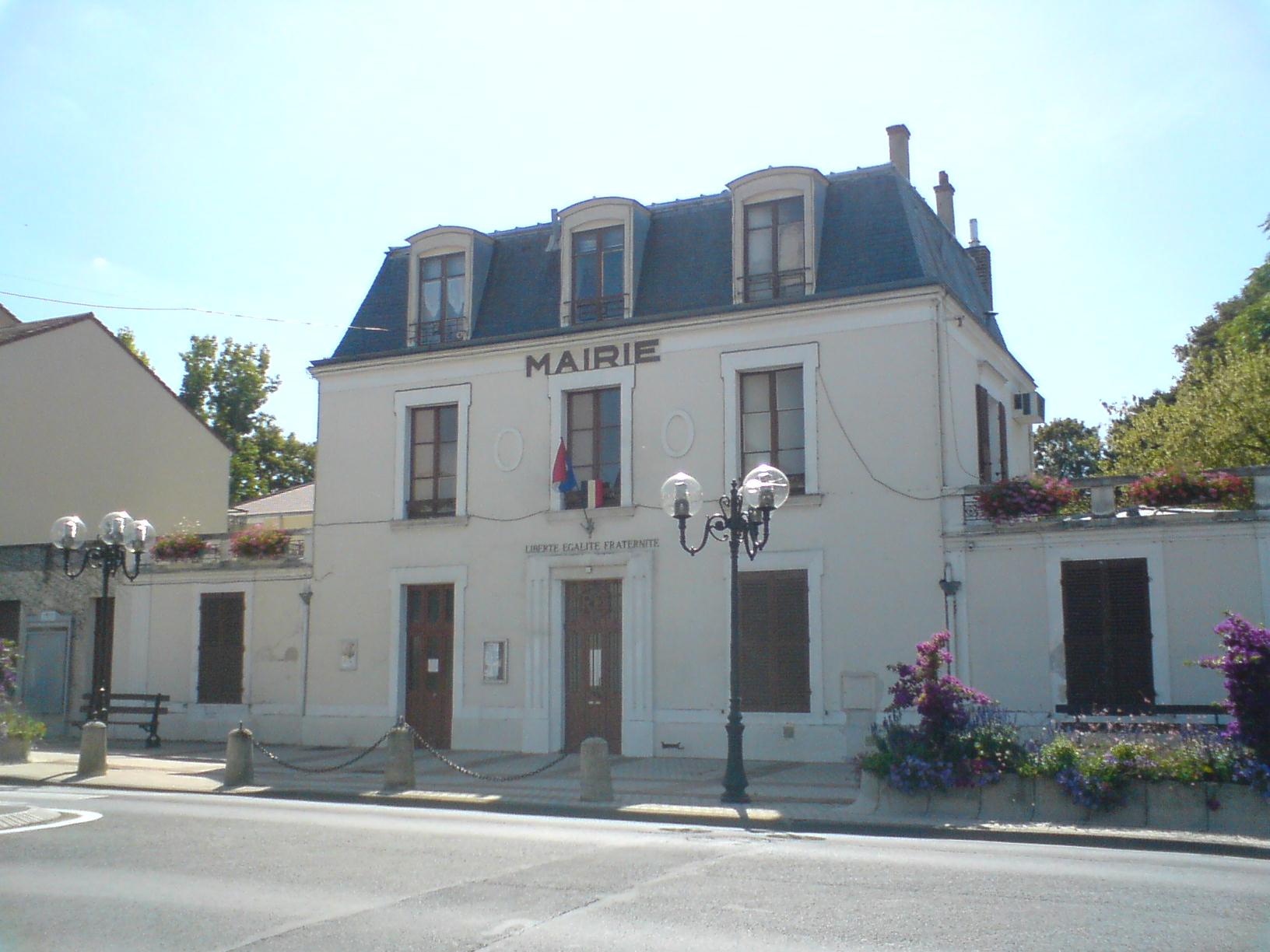 Mairie de Crosne (Essonne)